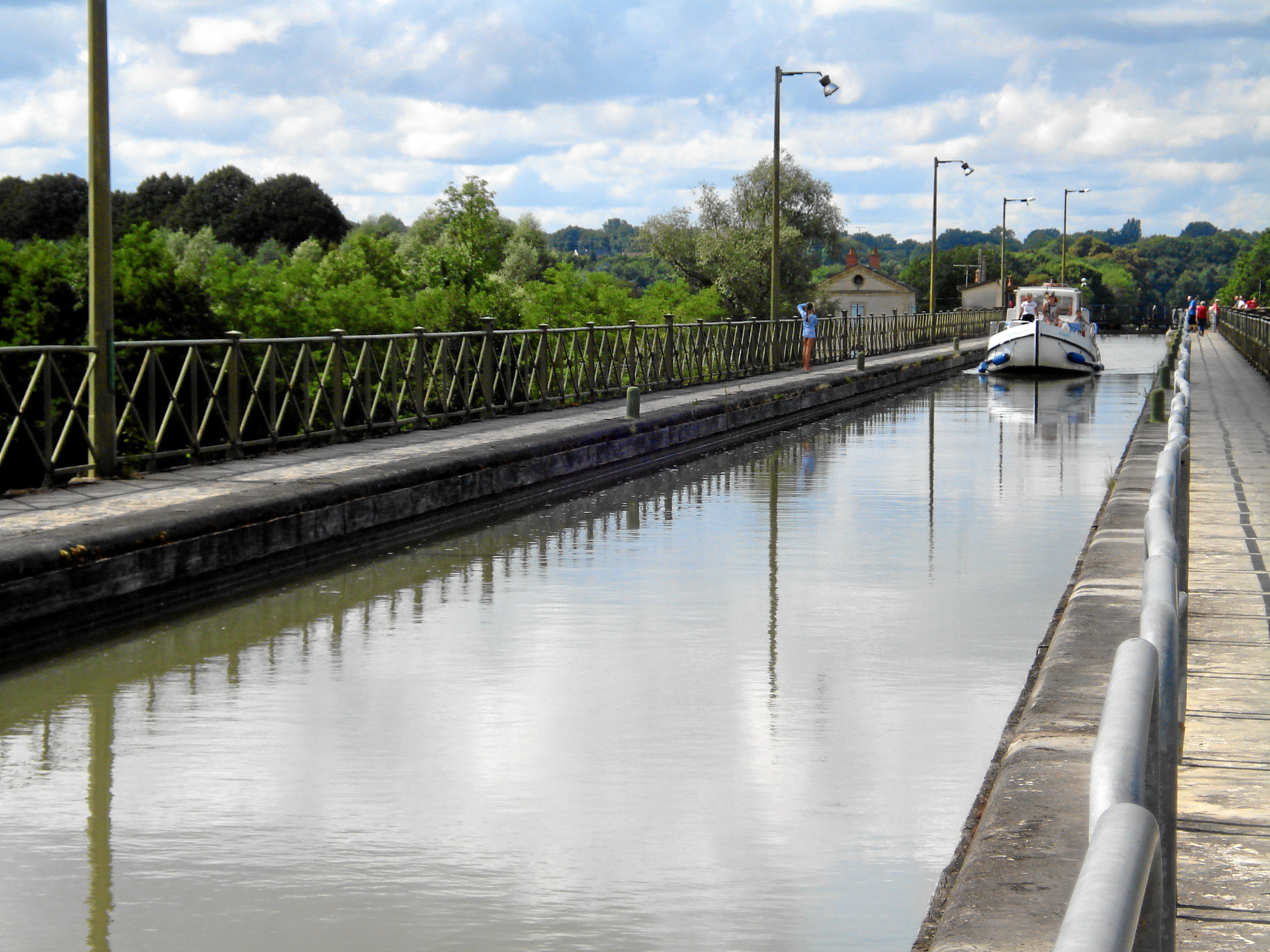 Pont canal du Guétin: Schleuse geschafft